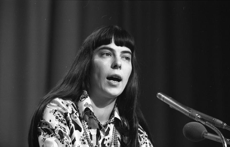 FDP-Bundesparteitag in der Rheingoldhalle in Mainz.